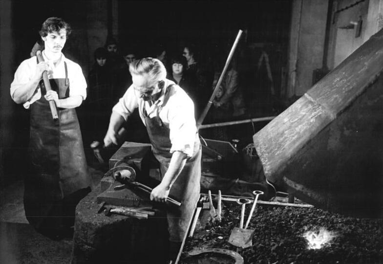 Zedtlitz, Neujahrsschmieden ADN-ZB Gahlbeck 30.12.82 Bez. Leipzig: Sylvester-Schmieden- Seit rund 60 Jahren ist es in der Dorfschmiede von Erhard Teichmann in Zedtlitz, Kreis Borna, üblich, in der Sylvesternacht ein Paar Hufeisen zu schmieden. Die Arbeit beginnt beim mitternächtlichen Glockenschlag im Beisein von Freunden und Nachbarn. das Foto entstand während eines Probeschmiedens